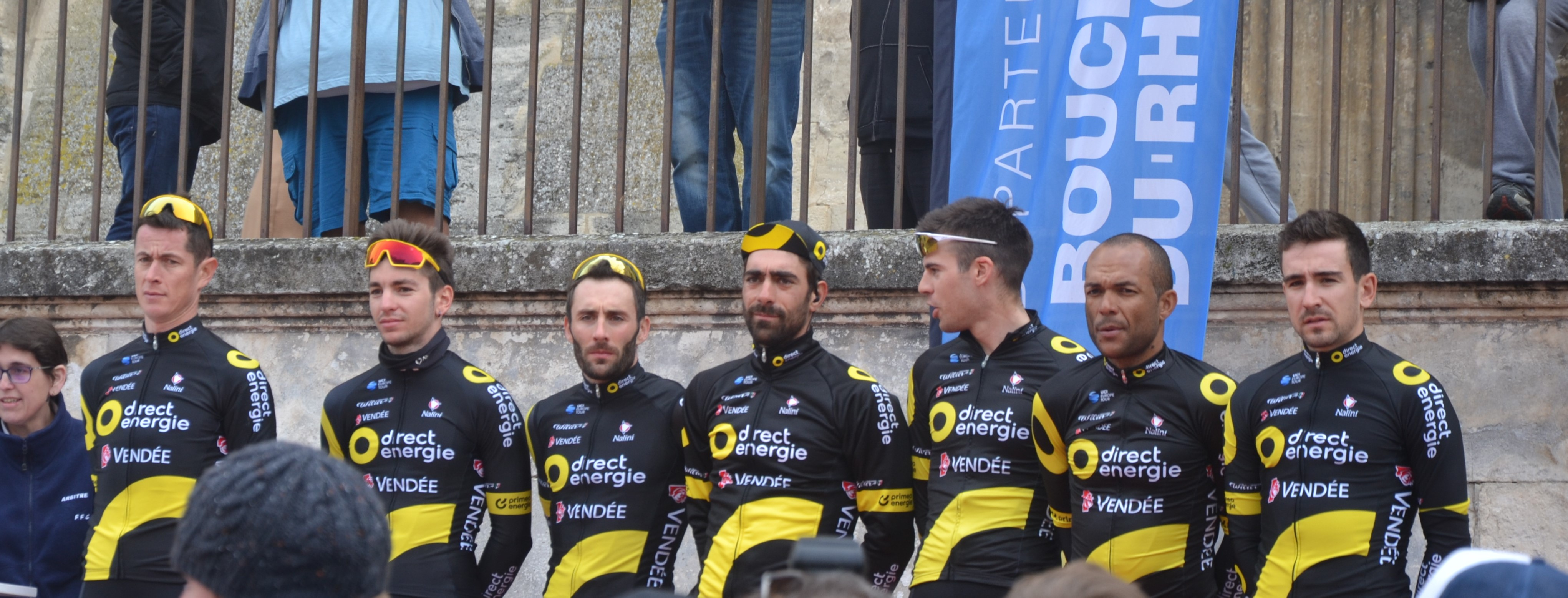 Lors du podium des signatures avant départ de l'étape